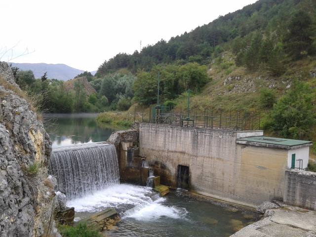 Lago del Giovenco a Pescina